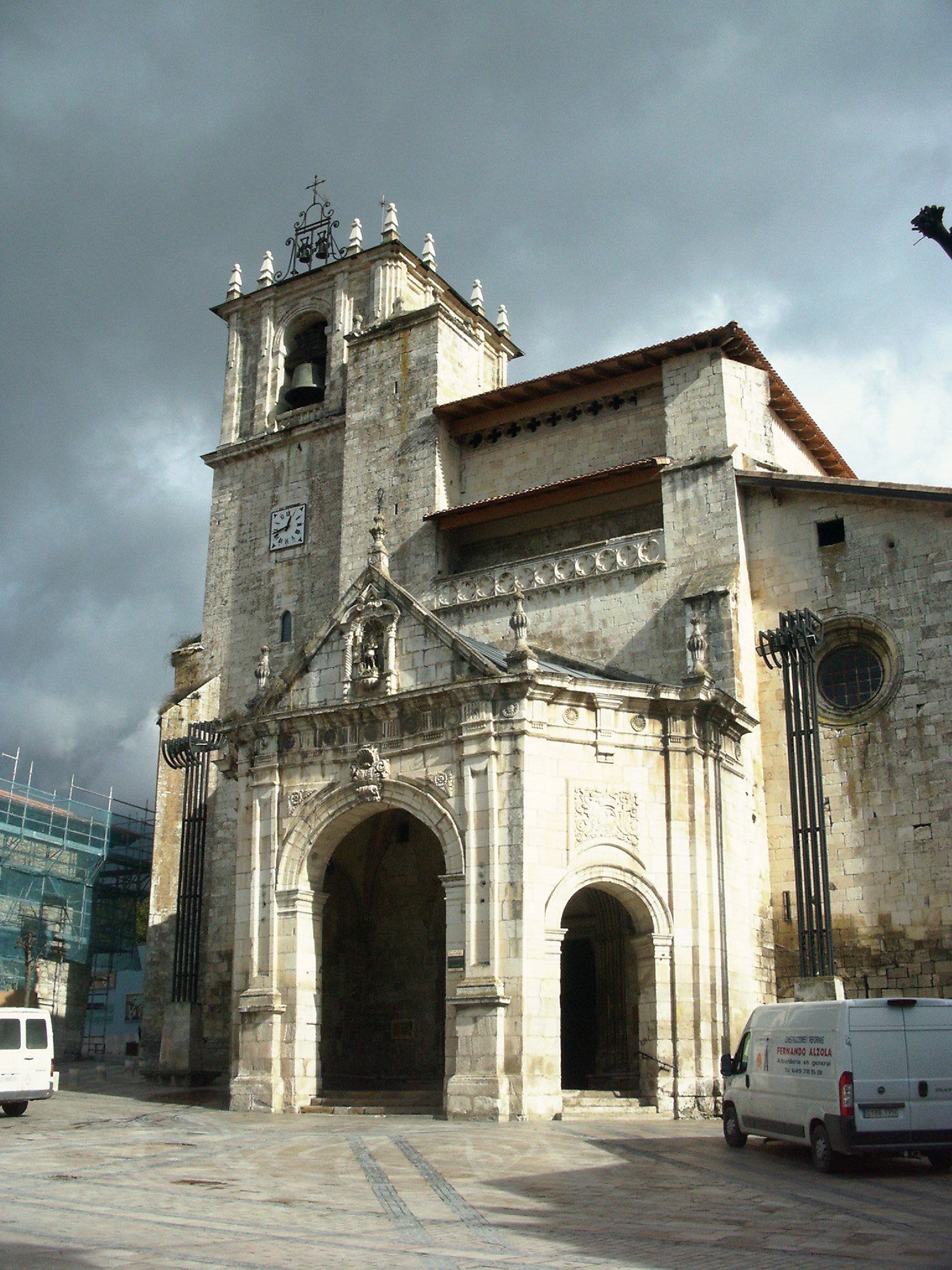 Aguraingo Donibane eliza.